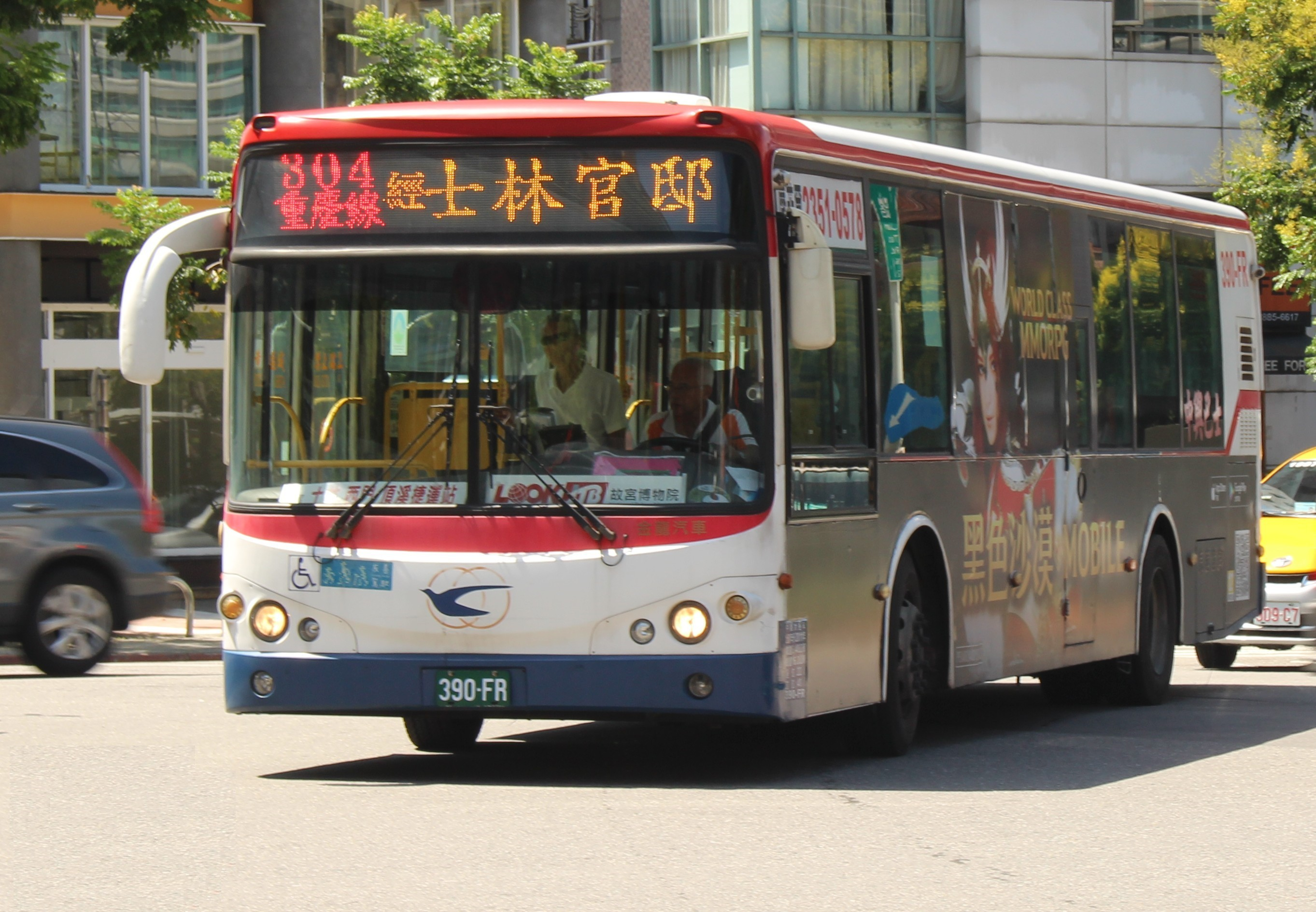 中興巴士 2011 KINGLONG KL6112U1四期 390-FR 304重慶